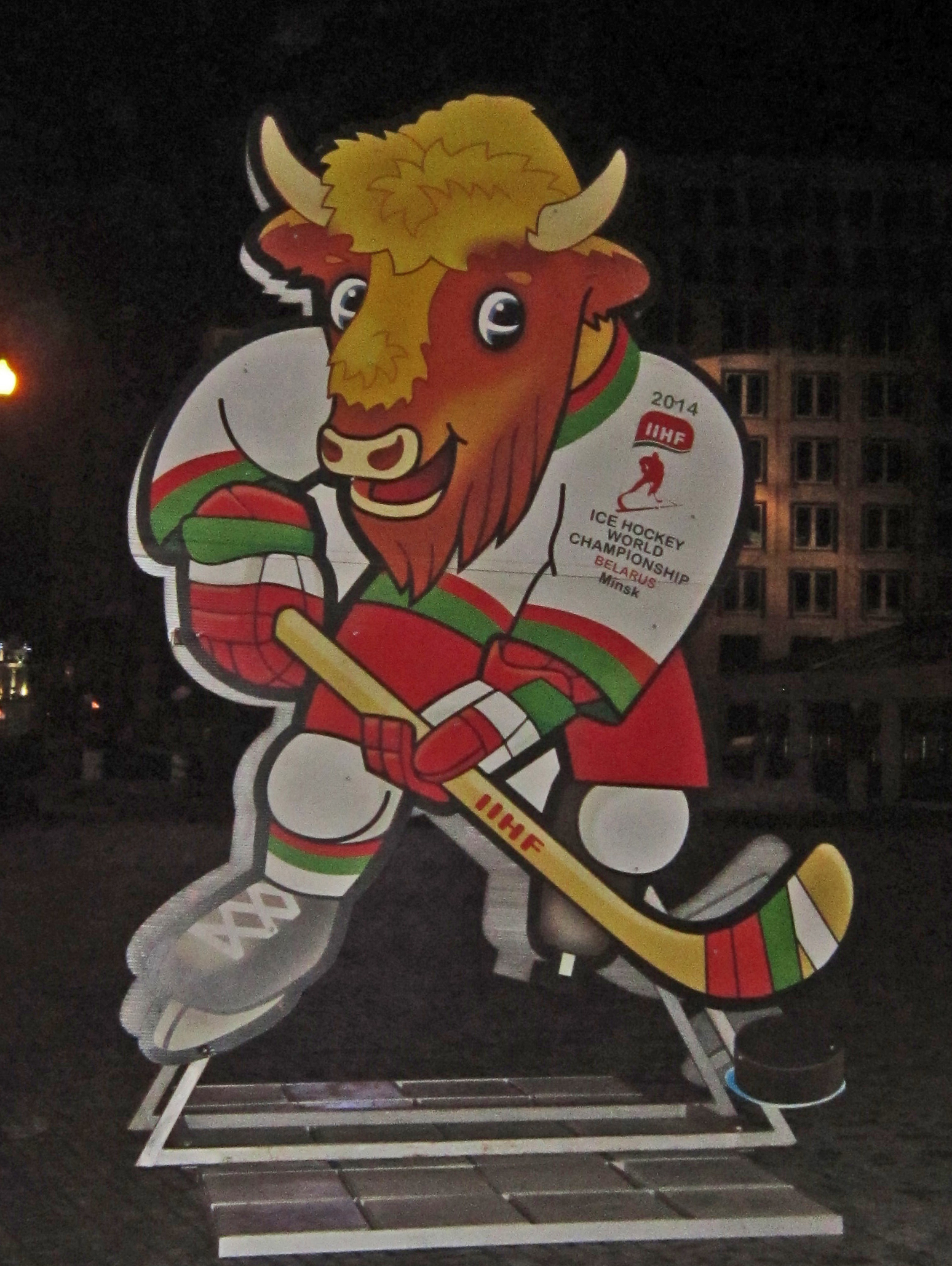 Официальный талисман чемпионата мира по хоккею с шайбой 2014 в Беларуси — зубр Волат, неофициально известный как Валера.